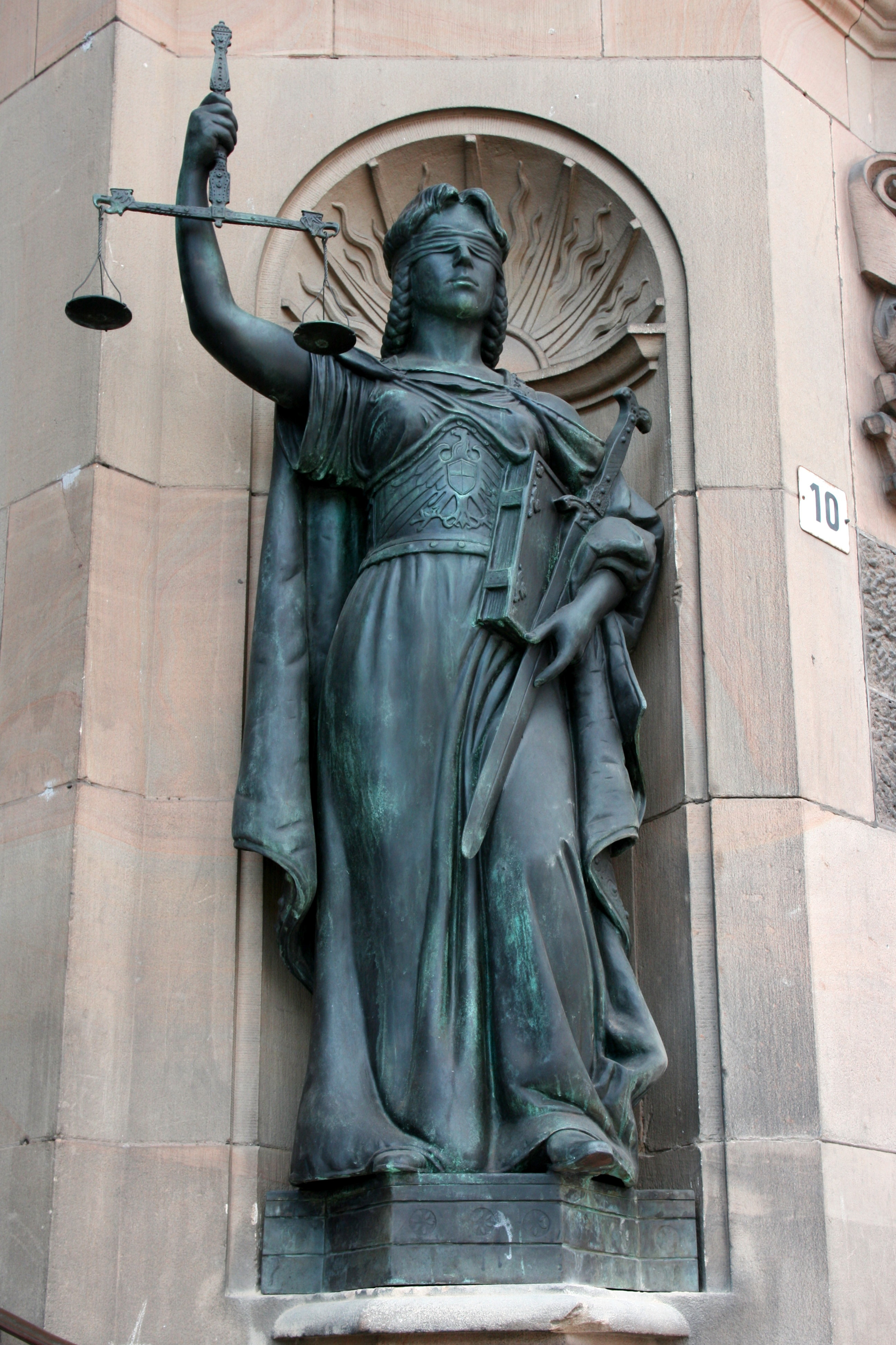 Gerechtigkeit am Rathaus in Wuppertal-Elberfeld